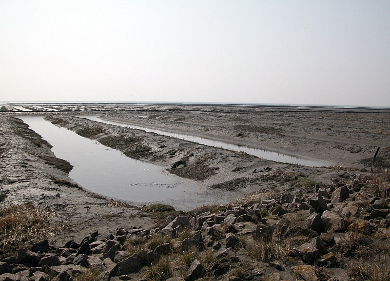 Landgewinnung an der Nordsee, Eiderstedt, Westerhever, Deutschland, Germany